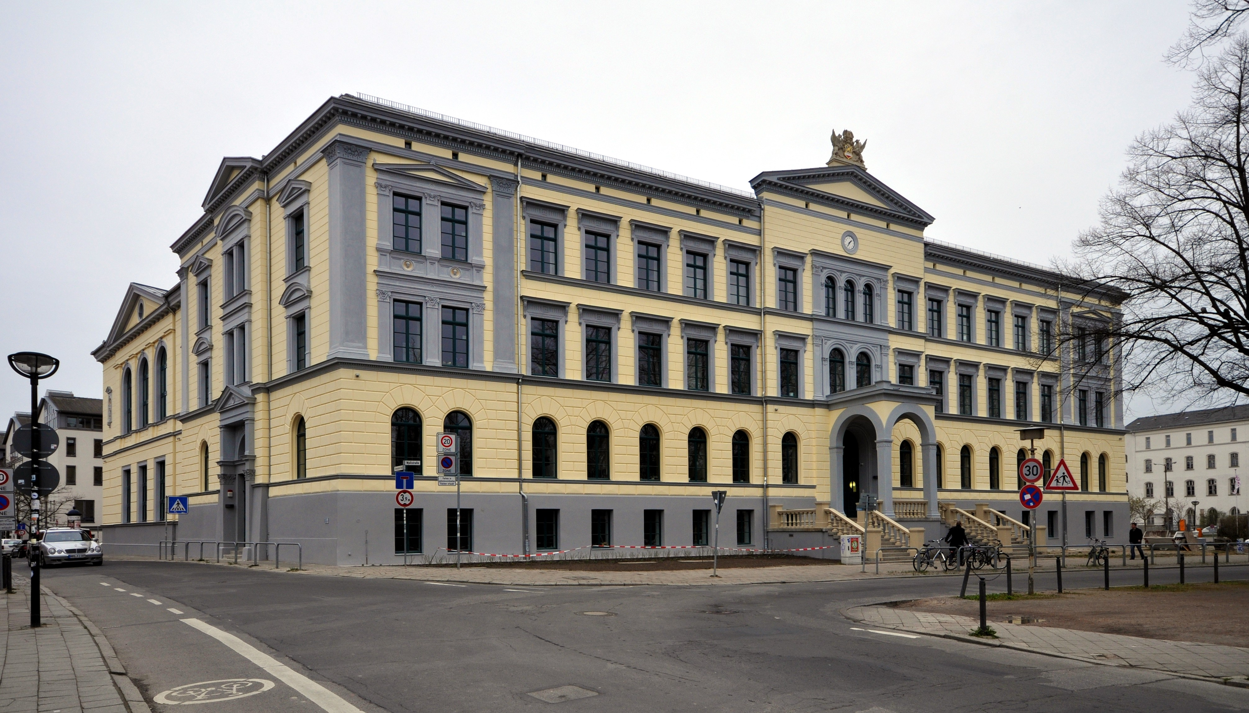 Große Stadtschule in Rostock, Wallstraße 1